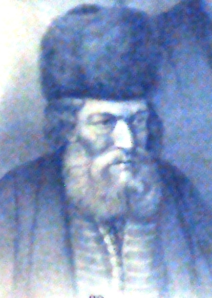 רבי אלעזר פלקלס